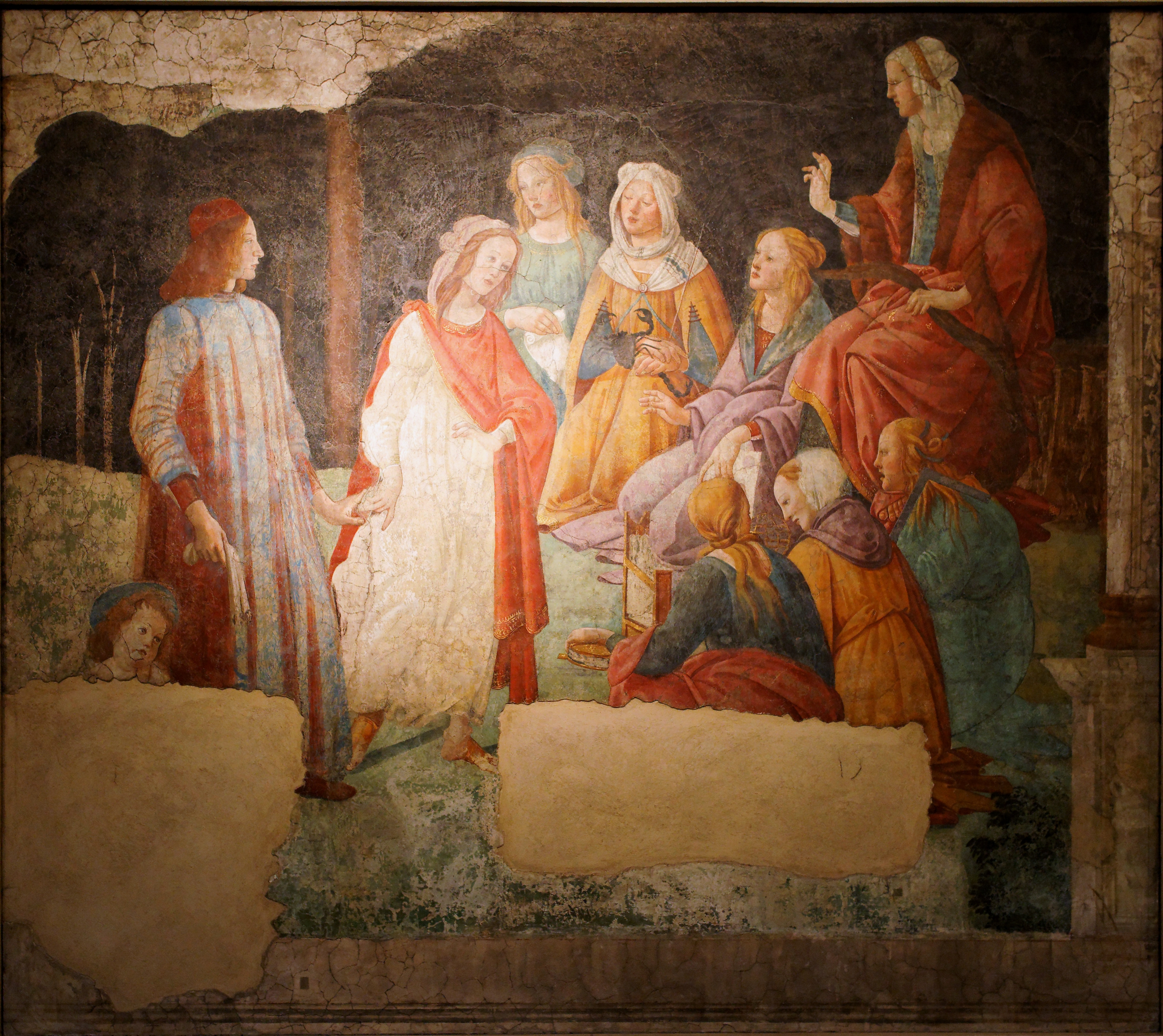 "Le Jeune Homme et les Arts"